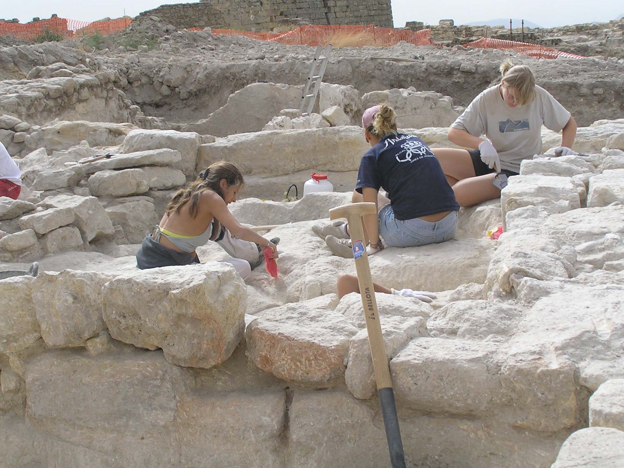 Excavaciones en Alcalá la Real, Jaén, España.